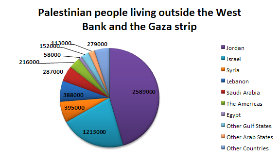 Palestinian outside Palestine